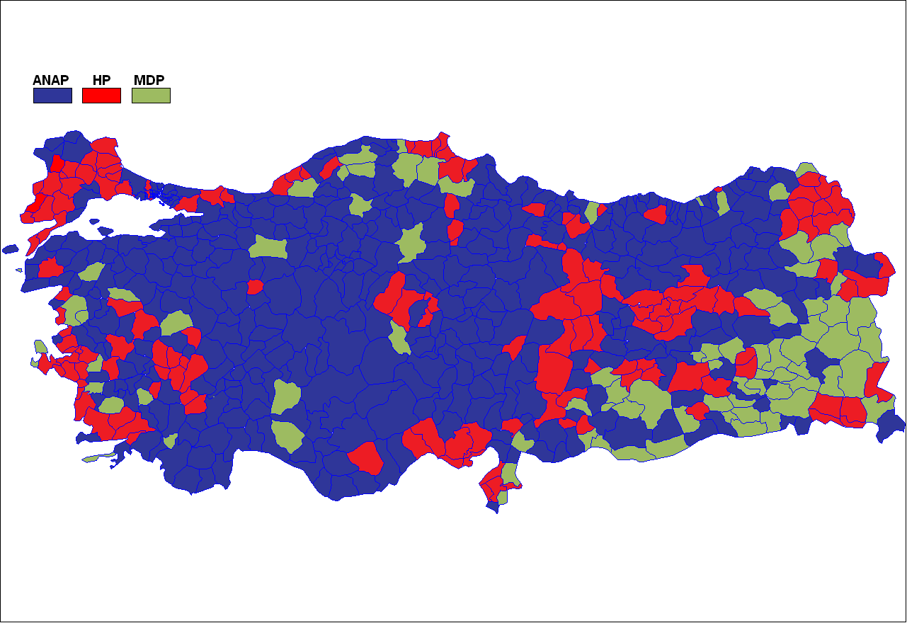 1983 genel seçimleri sonuçlarının Türkiye ilçeler haritasında gösterimi.